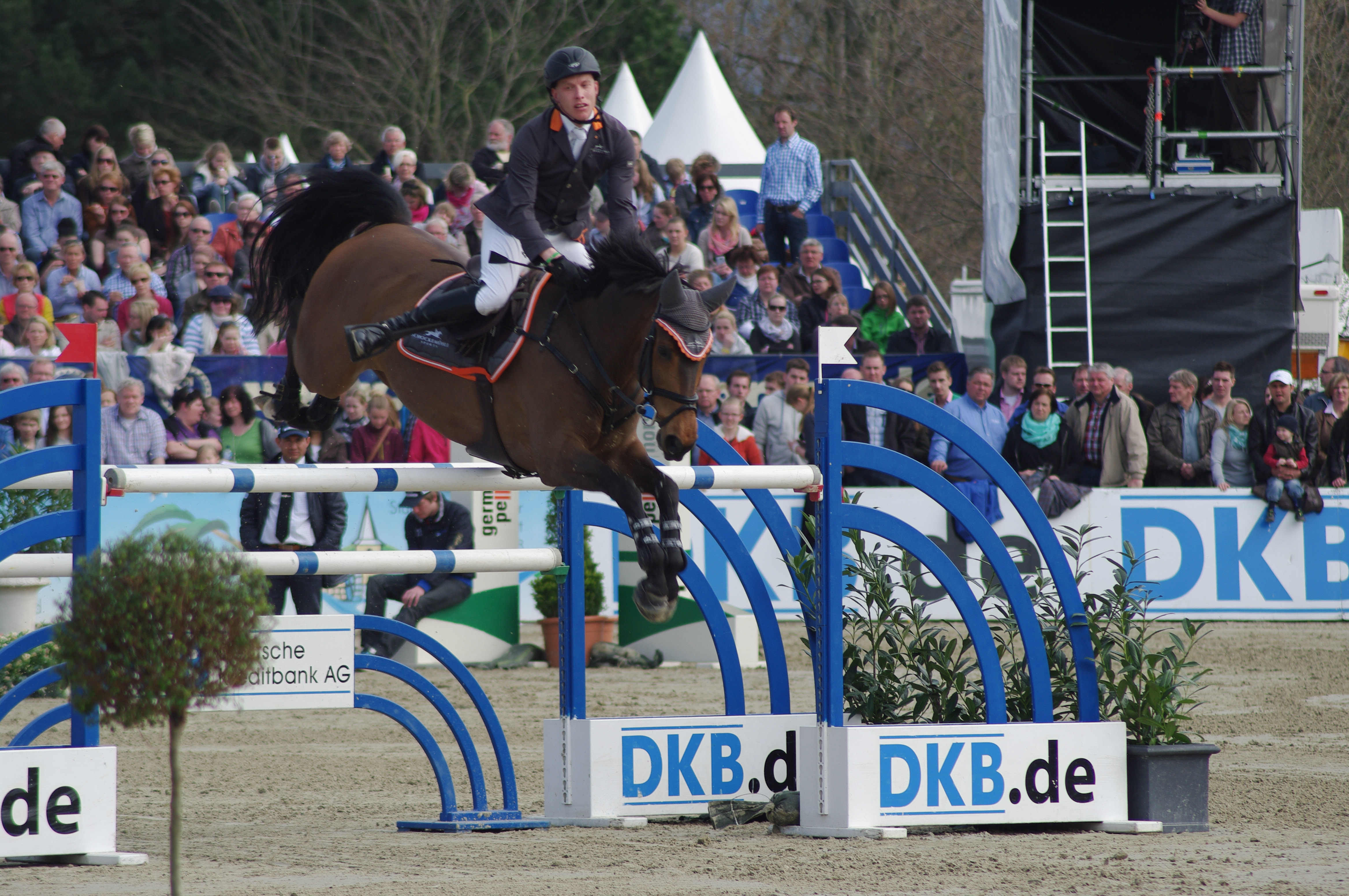 Horses & Dreams 2013: Mario Stevens mit "Little Pezi